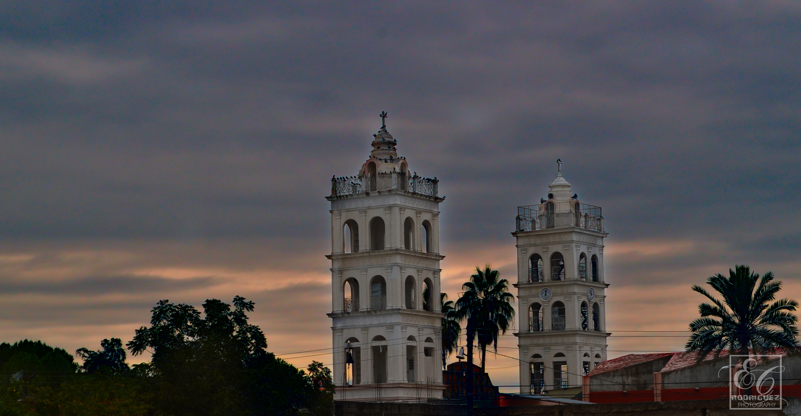 Torres de la iglesia de San Buenaventura Coahuila by: ECRodriguez